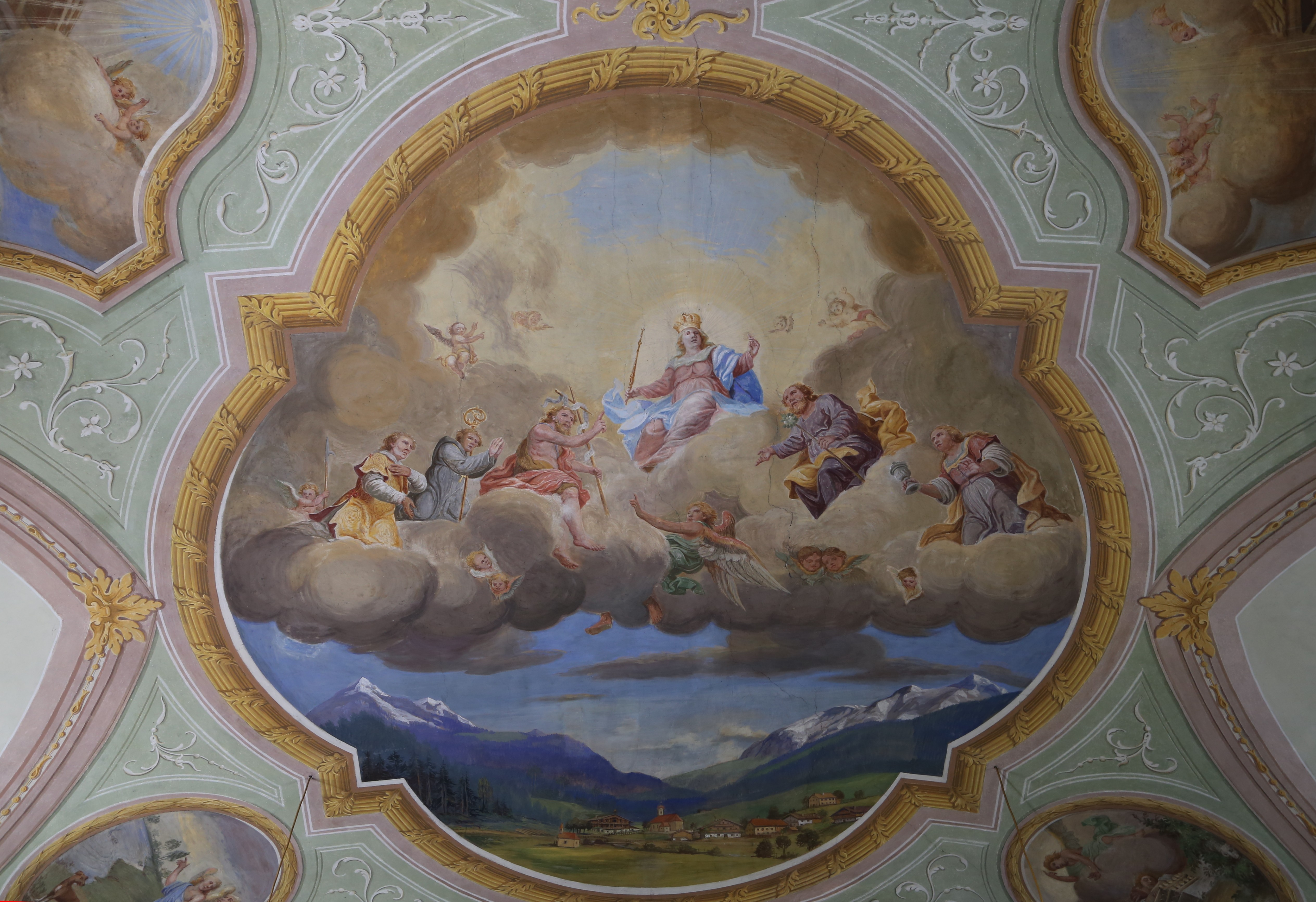 Kath. Pfarrkirche Mariahilf und Friedhof, Landl, Thiersee